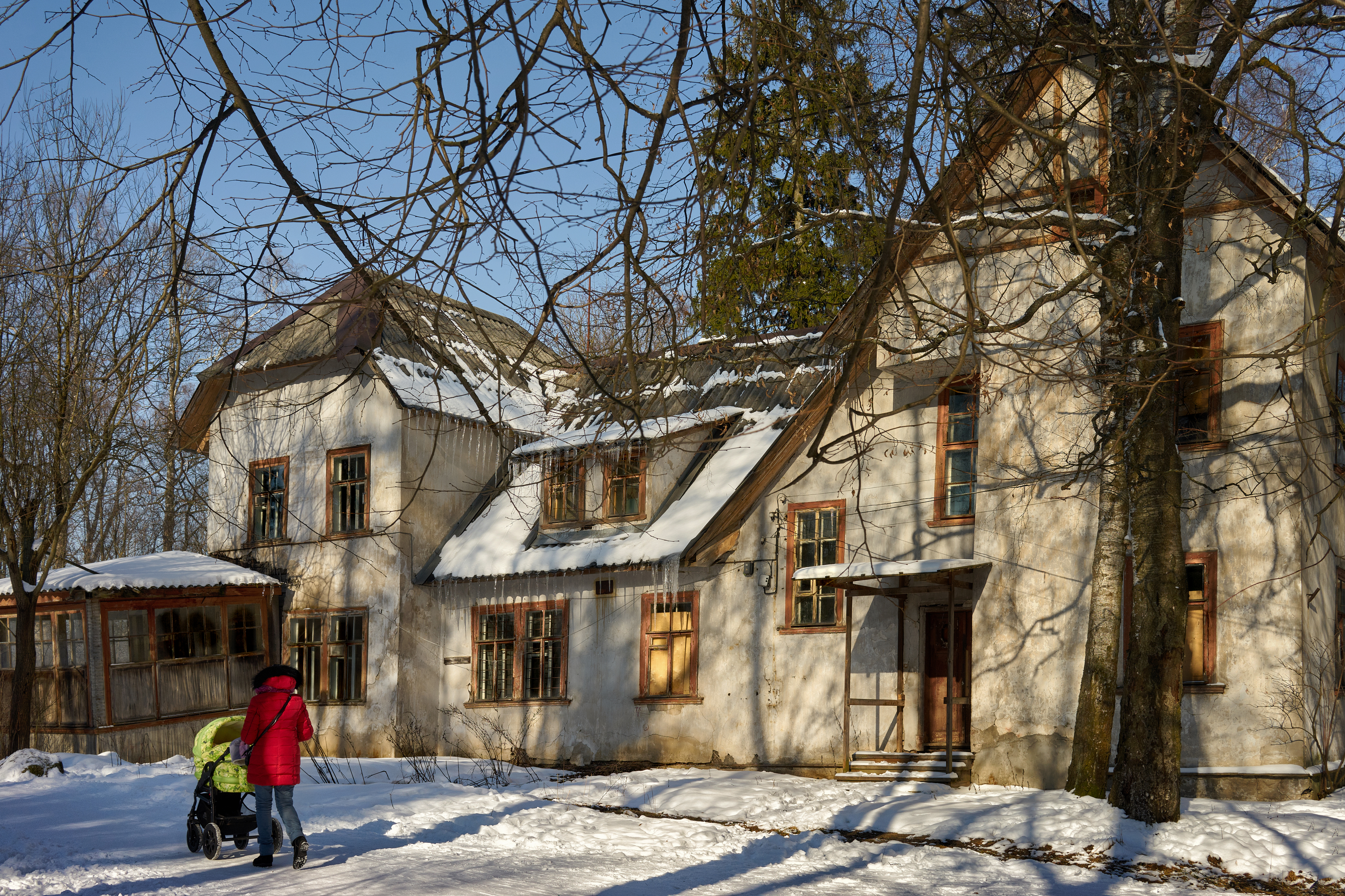 Дом Орбели. Павлово.